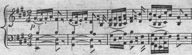 London: Monzani & Hill, n.d.[1807-13].